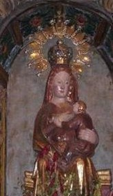 Bocos de Duero. Nuestra Señora de la Nieves, Santa Patrona.